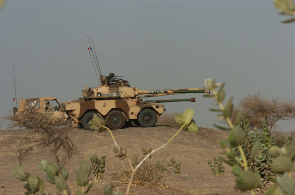 ERC90-Sagaie. ERC90-Sagaie.